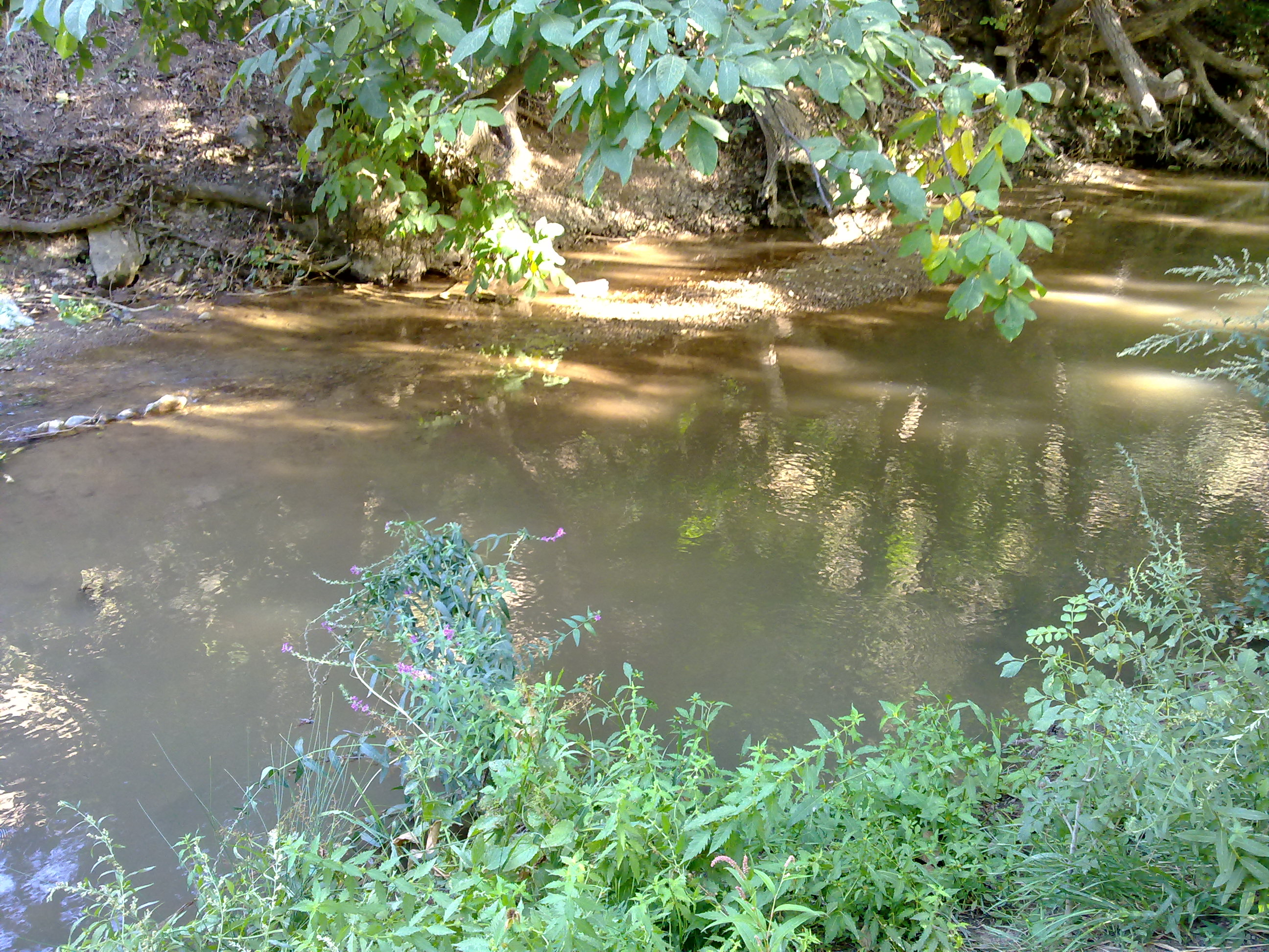 نزدیک دره‌ی قاسملو